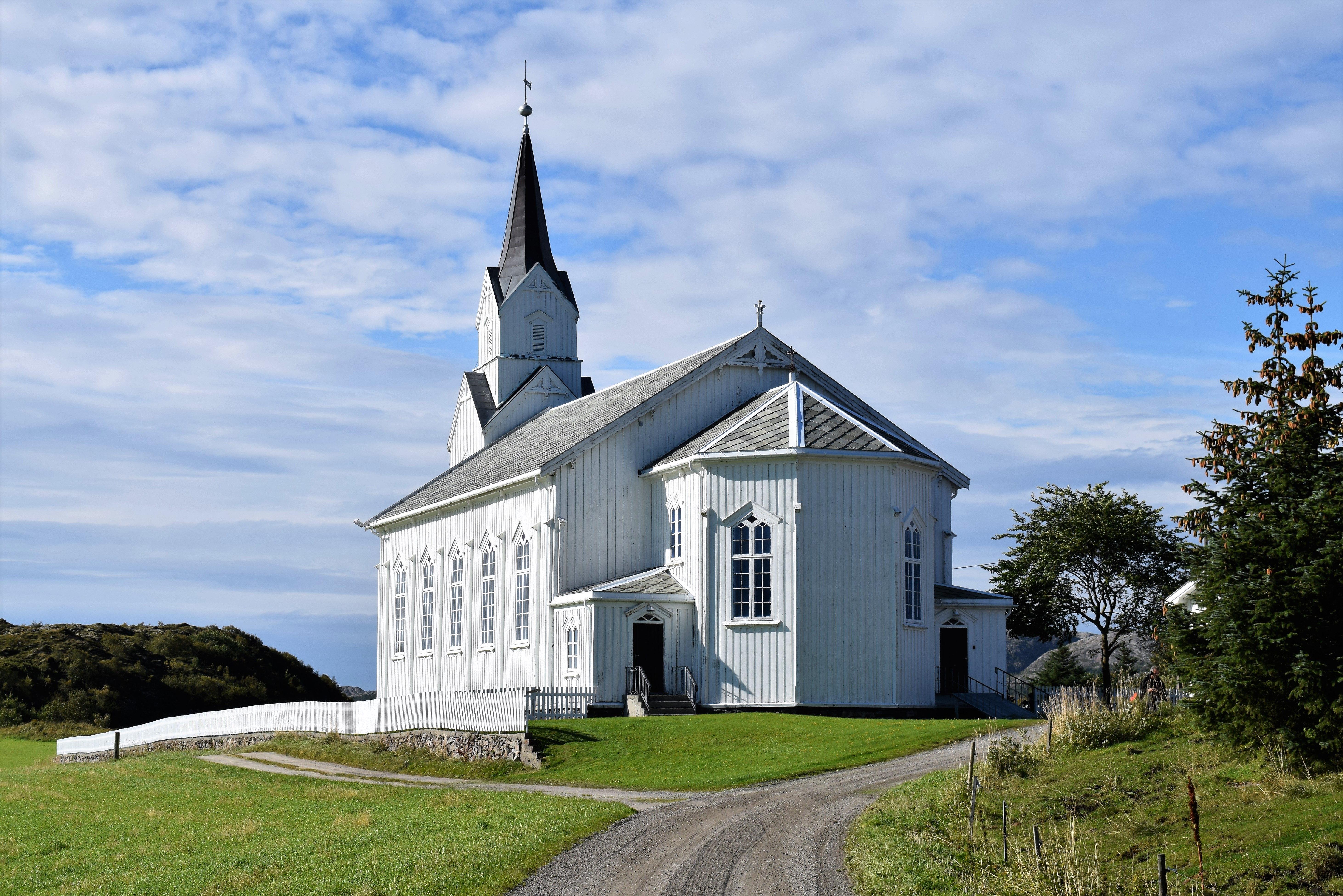 Lundring kirke i Nærøy sogn i Namdal prosti.